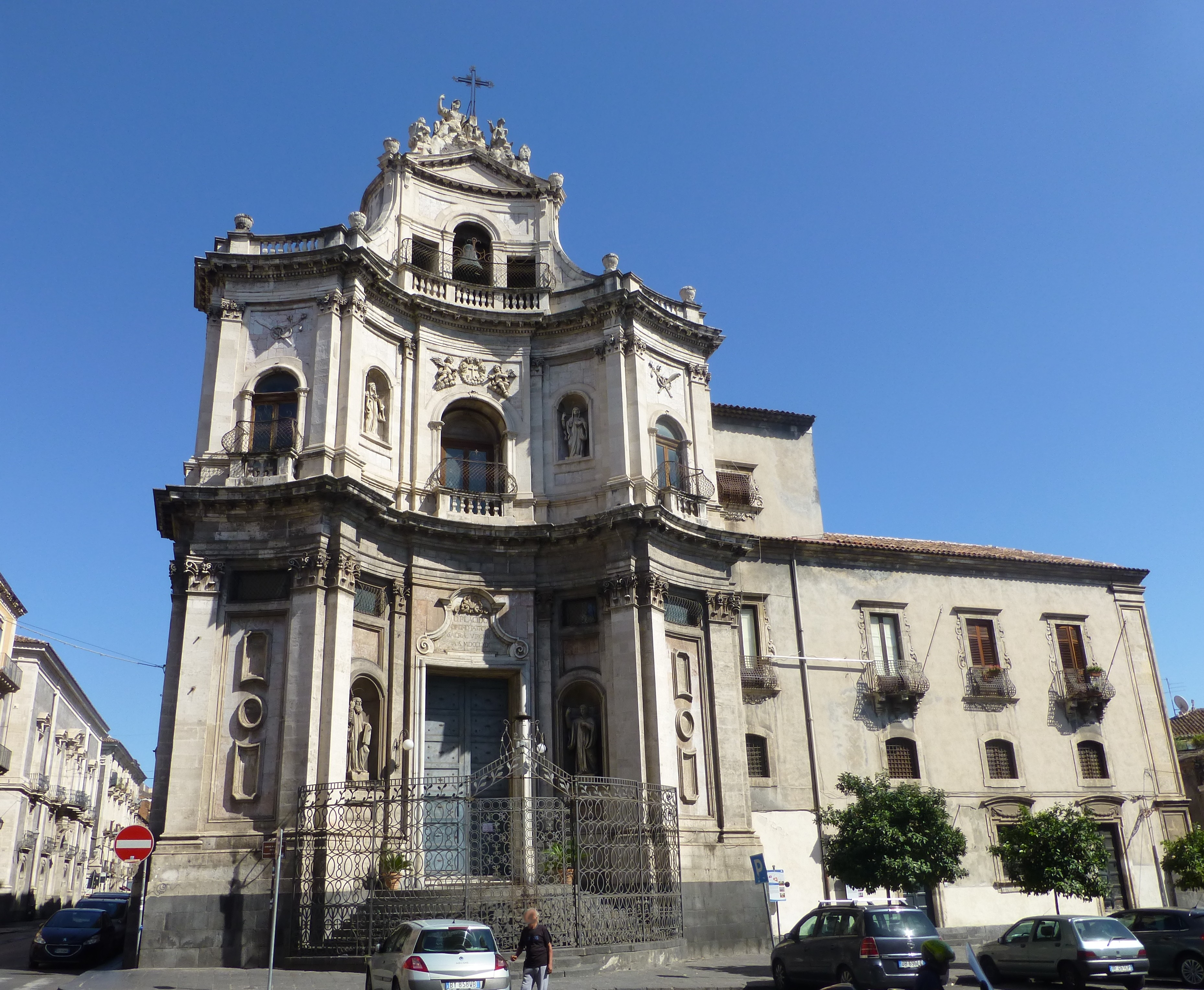 Catania - Chiesa di San Placido